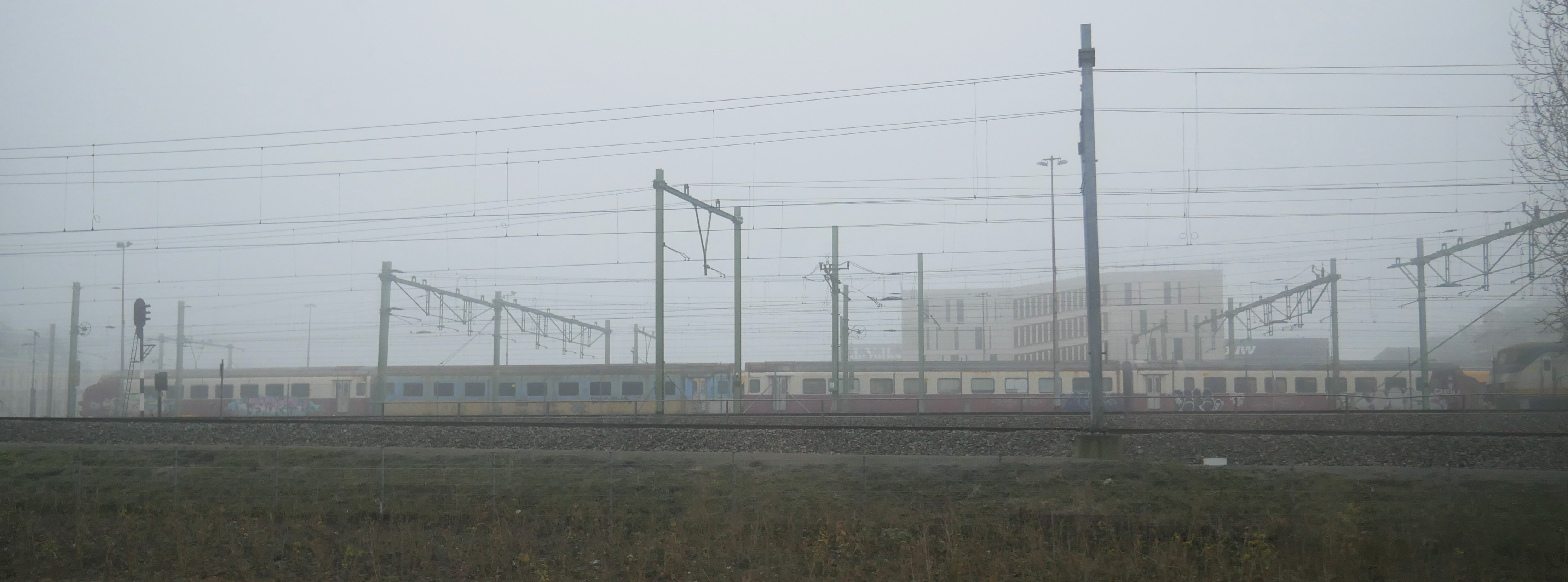 Der 4-teilge ex SBB RAm Triebzug, abgestellt in der Nähe vom Hbf von Amsterdam